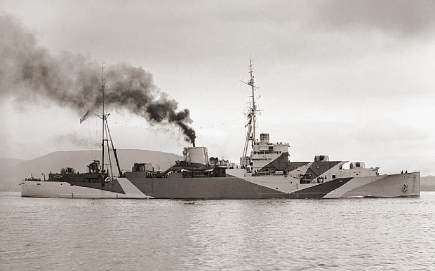 Das britische Jägerleitschiff 'Ulster Queen, 1943, eine umgebaute Fähre